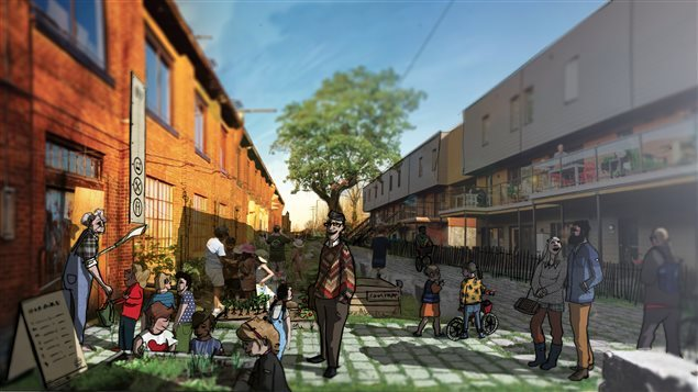 Batiment 7 ébauche